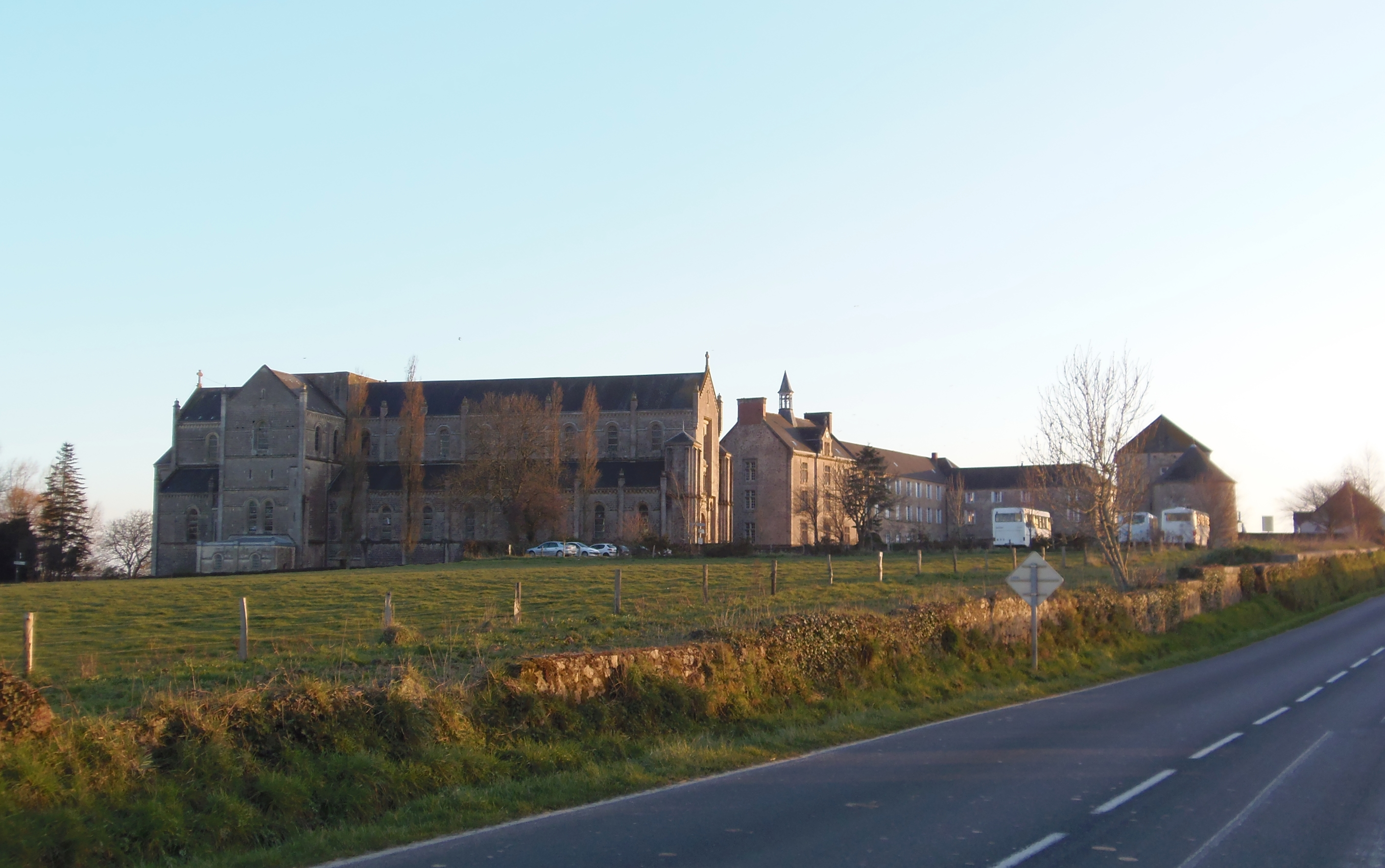 Montebourg (Normandie, France). L'abbaye Sainte-Marie.